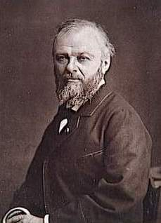 Portrait of Jean-Jacques Henner (1829-1905), French painter